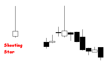 Analisi Tecnica, Candele giapponesi, Shooting Star.